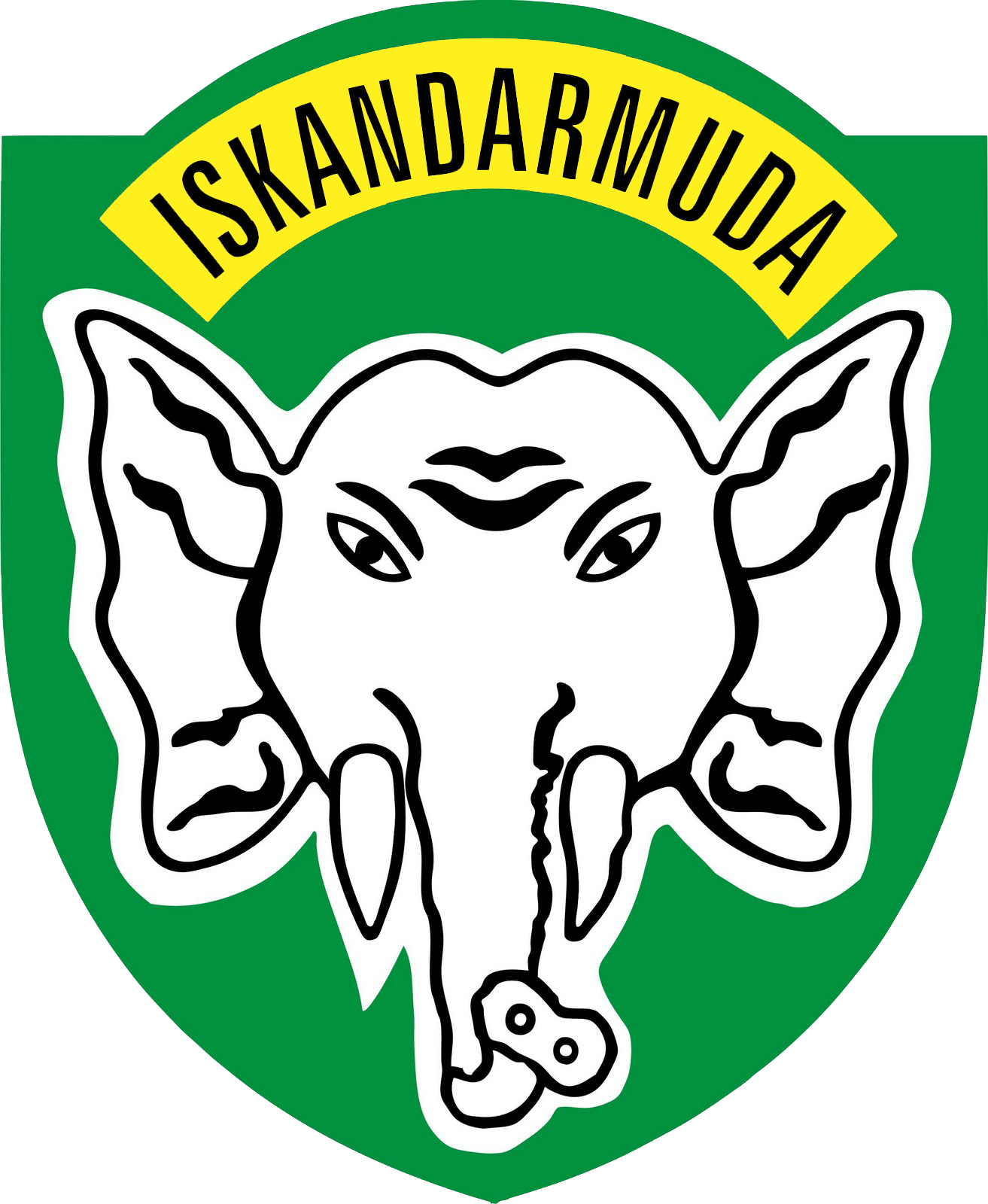 Gambar ini adalah Lambang Komando Daerah Militer Iskandar Muda